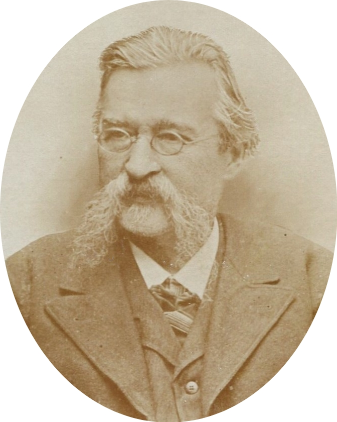 Foto Rudolf Lavant